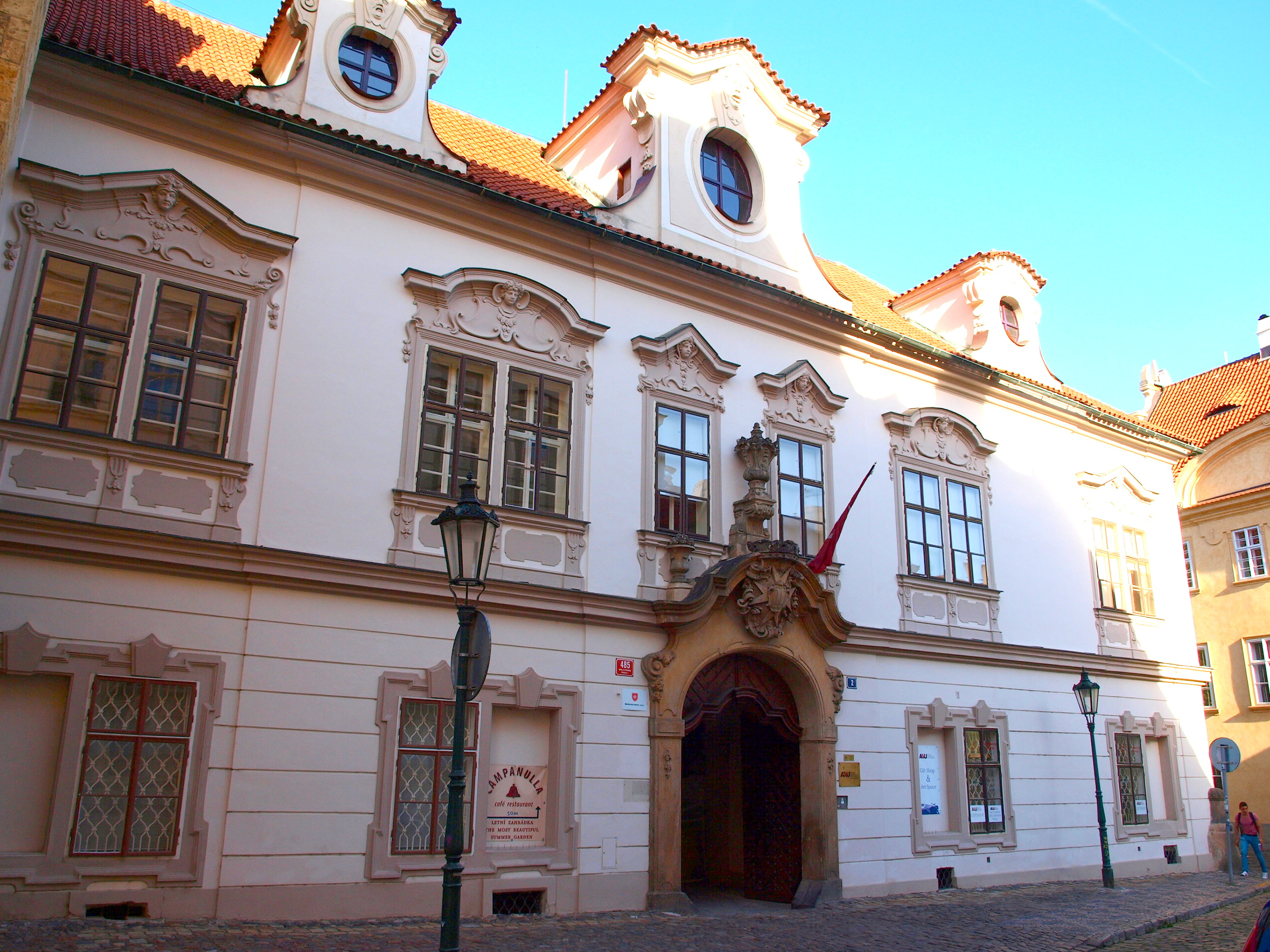 Velkopřevorský palác, Malá Strana